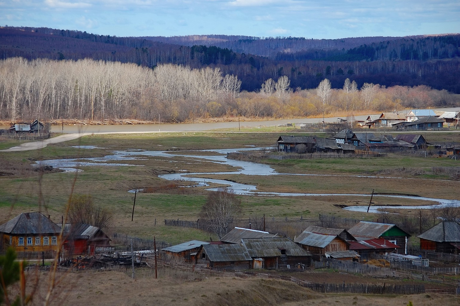 Река Шемаха течёт к Уфе (на заднем плане)